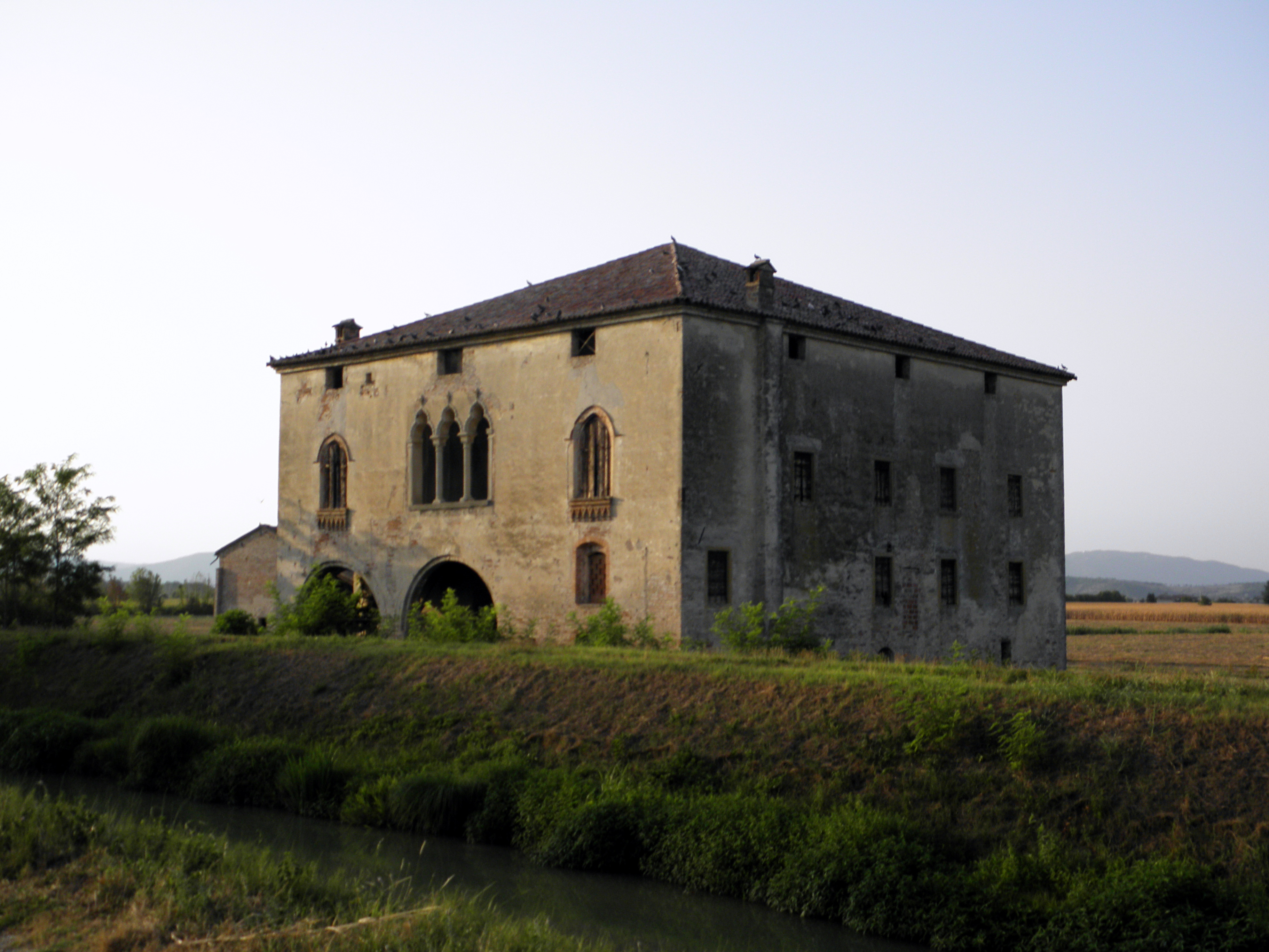 Agugliaro: Villa Dal Verme. Istituto Regionale Ville Venete (pdf)